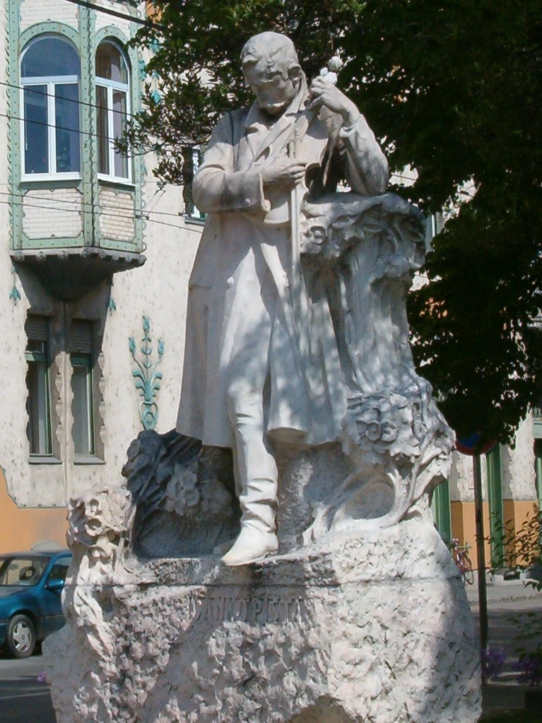 Dankó Pista nótaszerző műemlék szobra (ID 9265) Szegeden.